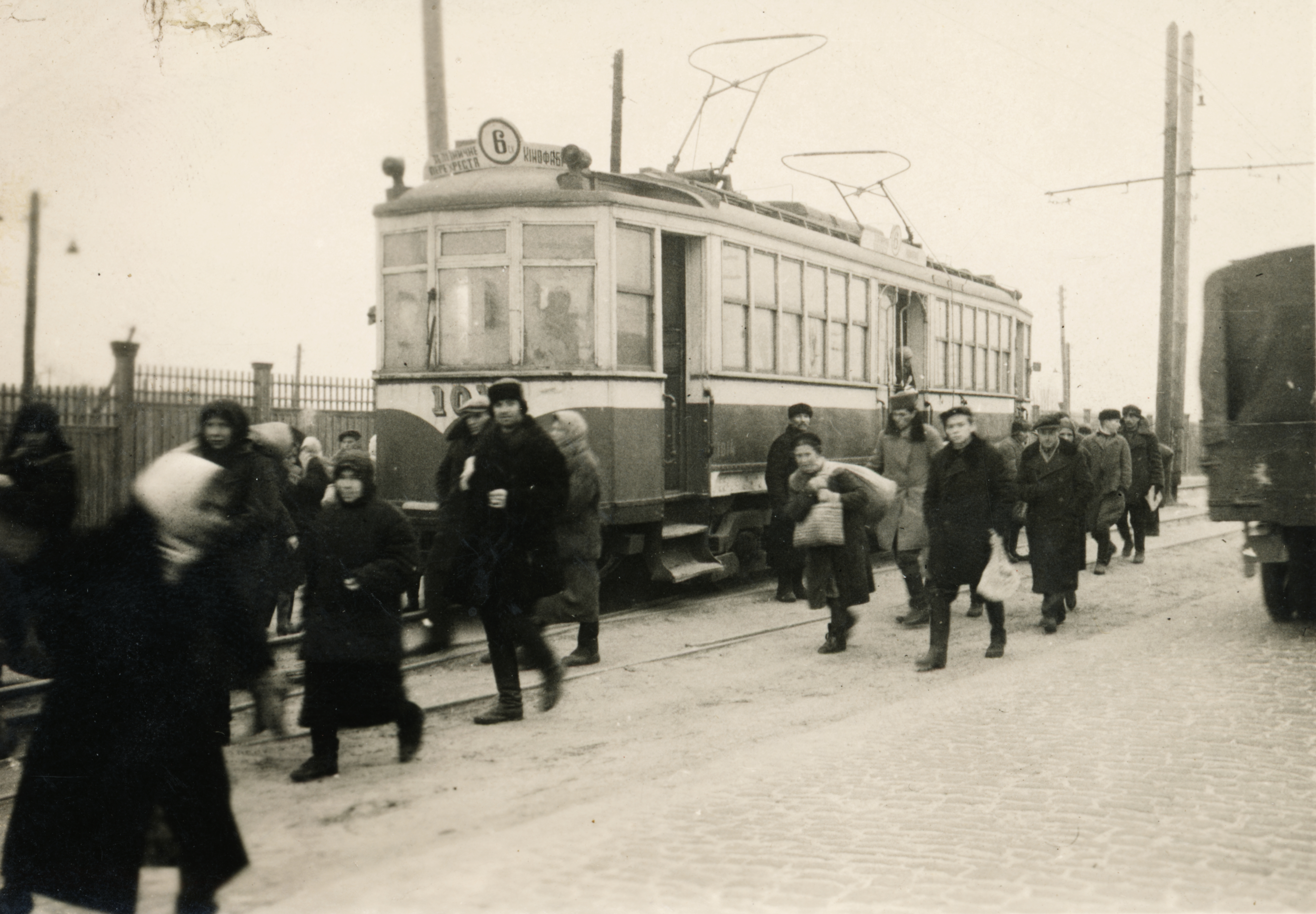 Трамвай № 6. Надпис: Залізничне перехрестя - Кінофабрика. Київ, 1942